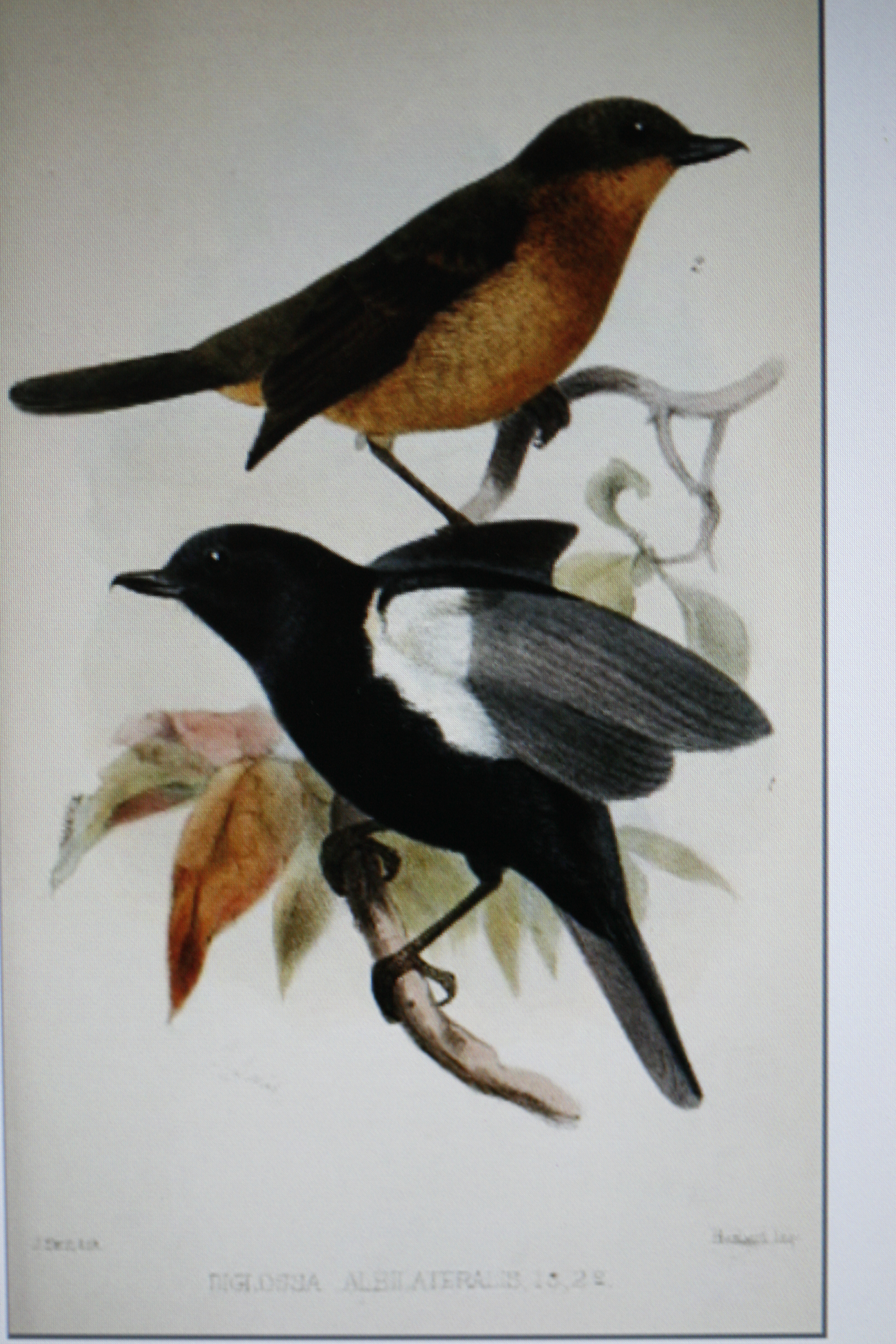 Diglossa albilatera (Männchen und Weibchen)